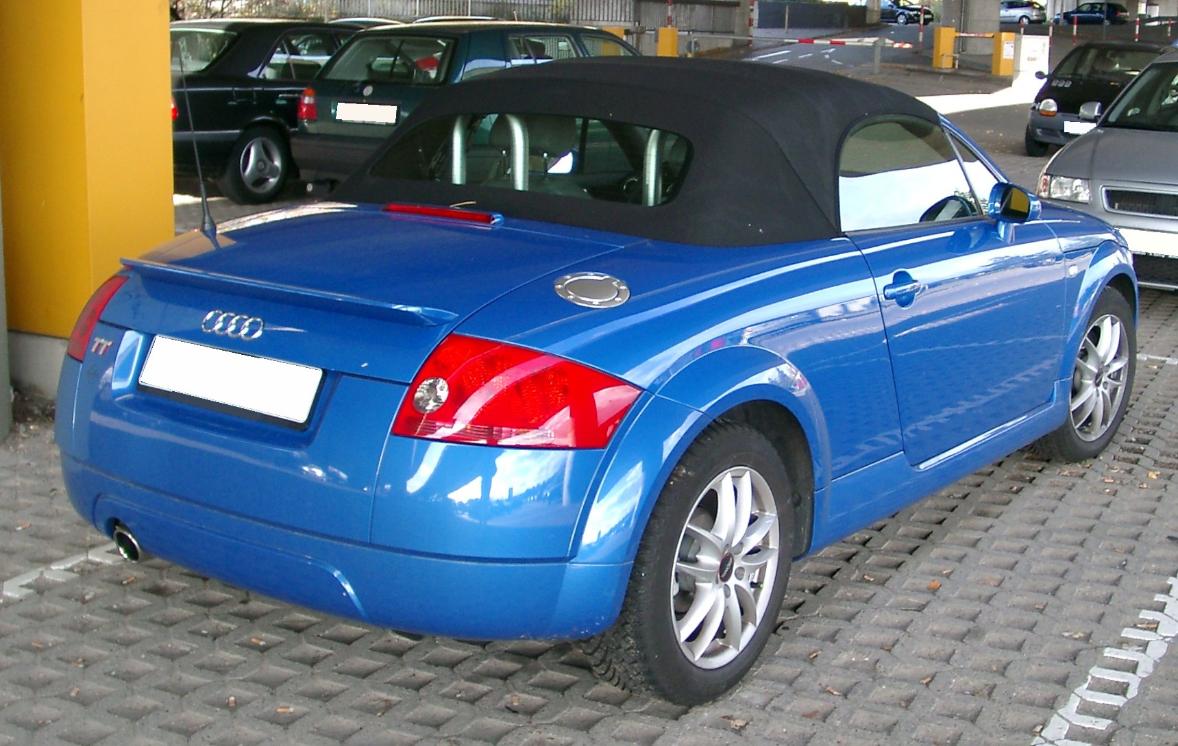 Audi TT, 1. Generation